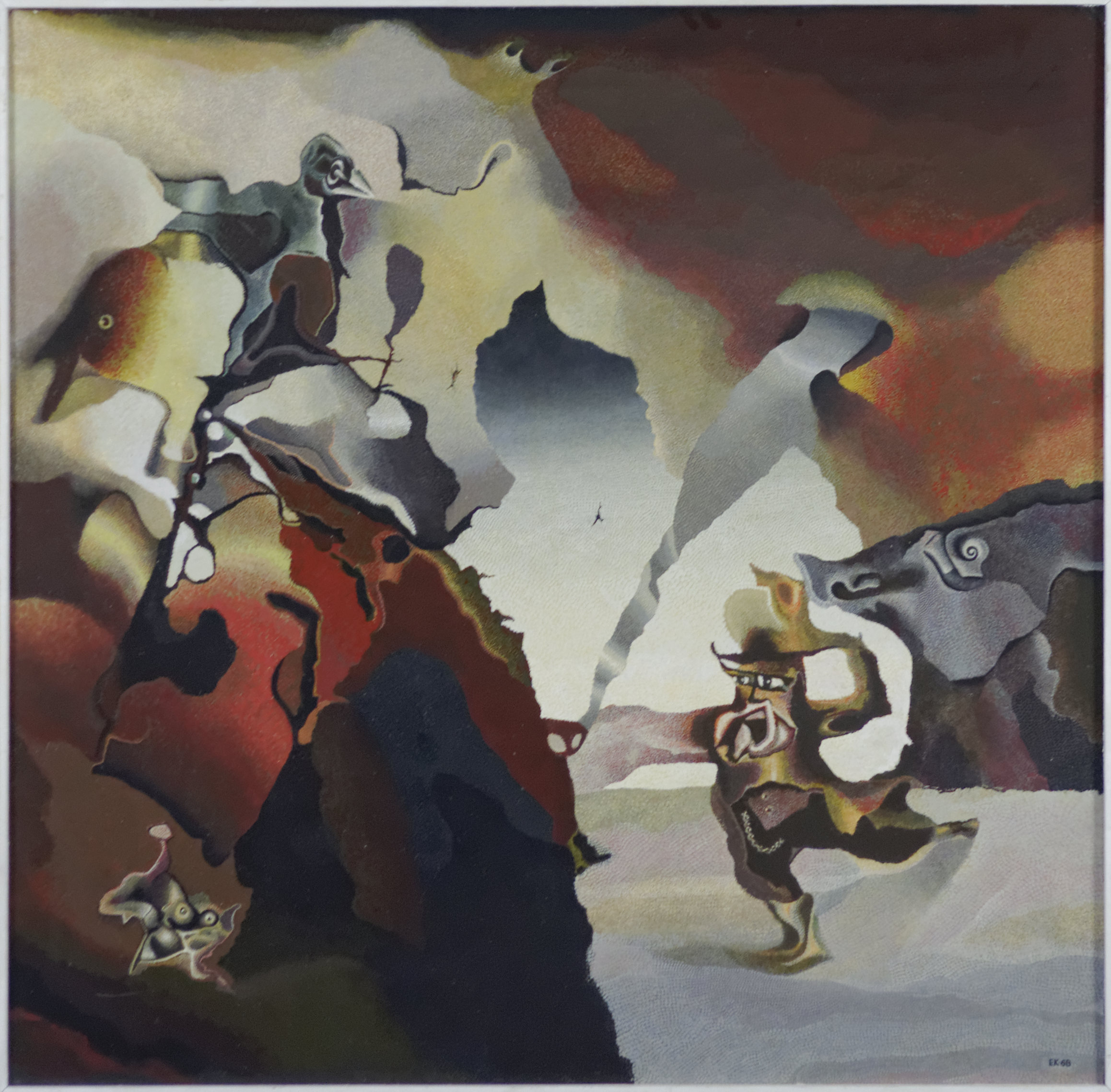 Dialog II mit Schlittschuhlaufendem Eisteufel, Öl auf Karton, 1968 (101 × 100 cm). Der Schlittschuhlaufende Eisteufel mit aufgerissenem Maul, die Weste und Uhrkette des bürgerlichen Biedermanns hält mühsam Balance.